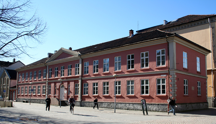 «Latinskolen», Kristiansand Katedralskole (opprinnelig bygning) i Gyldenløves gate 9.